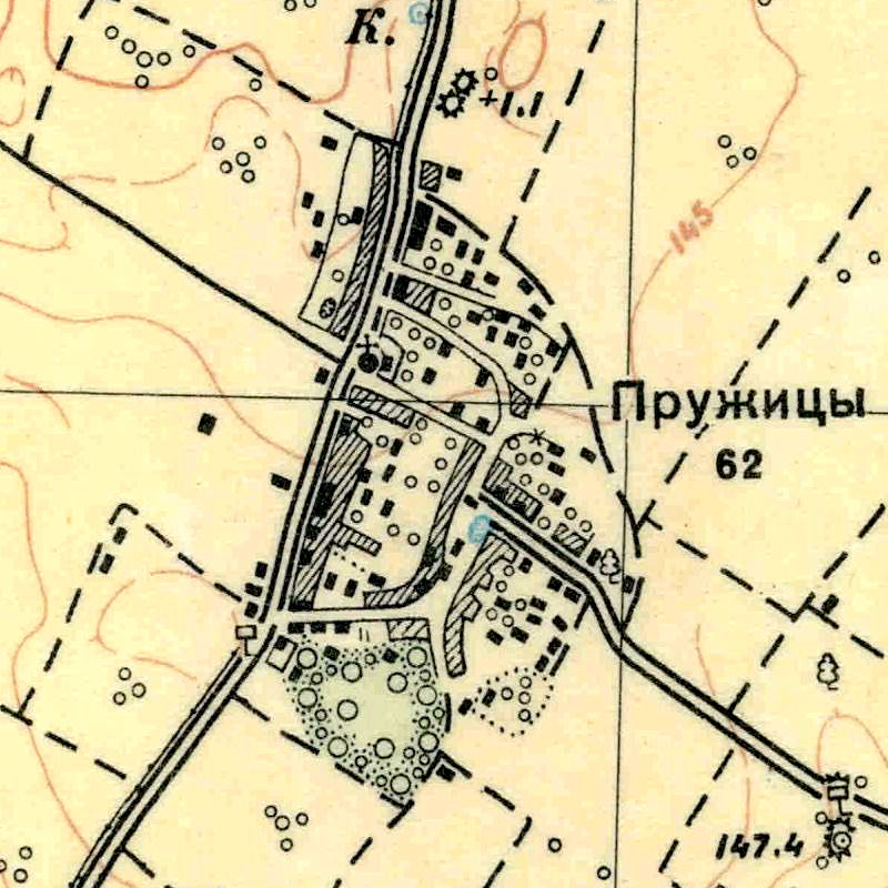 Топографическая карта Ленинградской области, квадрат О-35-23-А-в (Бол. Карчаны), деревня Пружицы